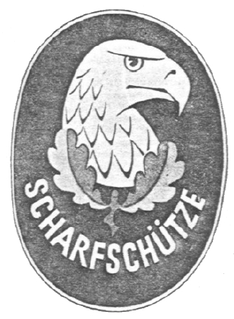 Prototyp/Versuchsmuster des deutschen Scharfschützenabzeichens der Wehrmacht (nicht in dieser Form eingeführt)